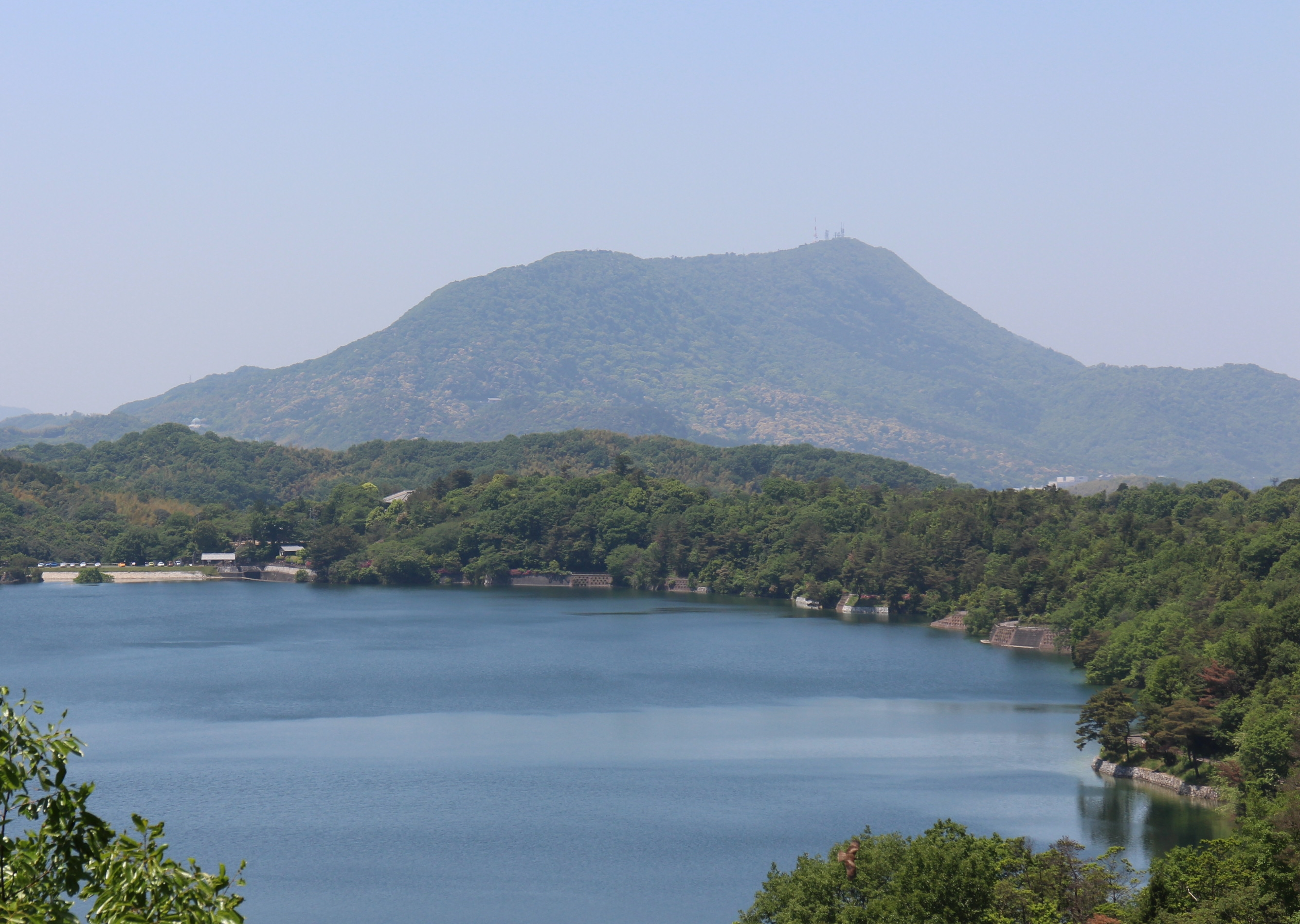 まんのう公園の展望デッキより見るまんのう池